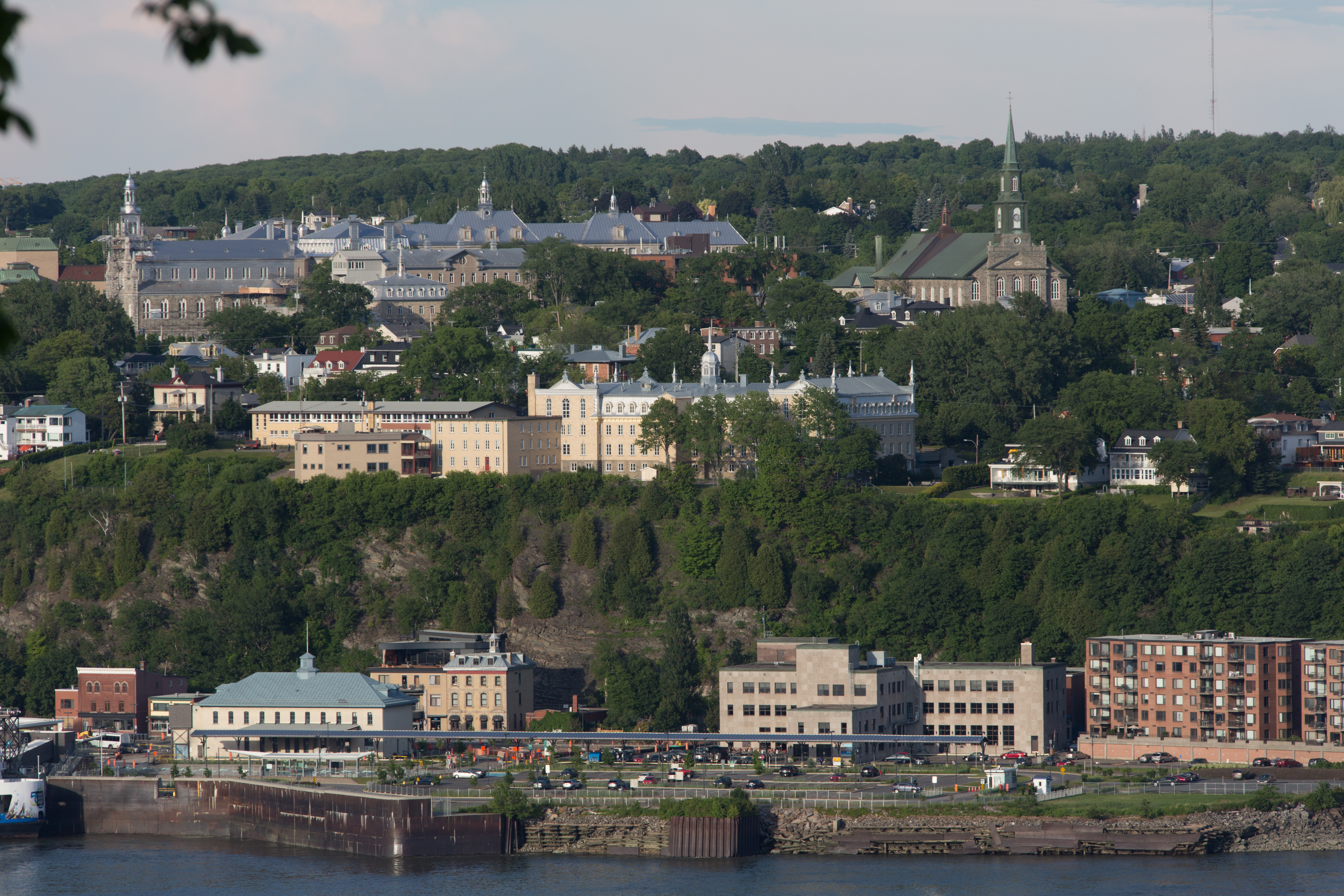 F29A2508.jpg